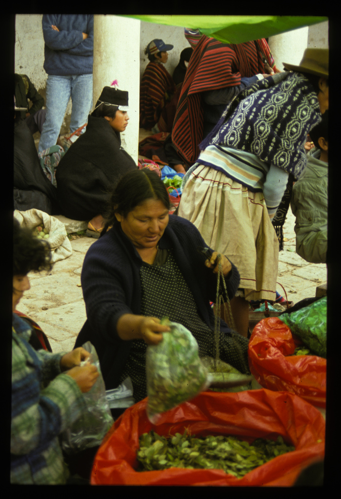 Bolivian coca.